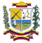 Escudo del municipio Ospino. Estado Portuguesa. Venezuela